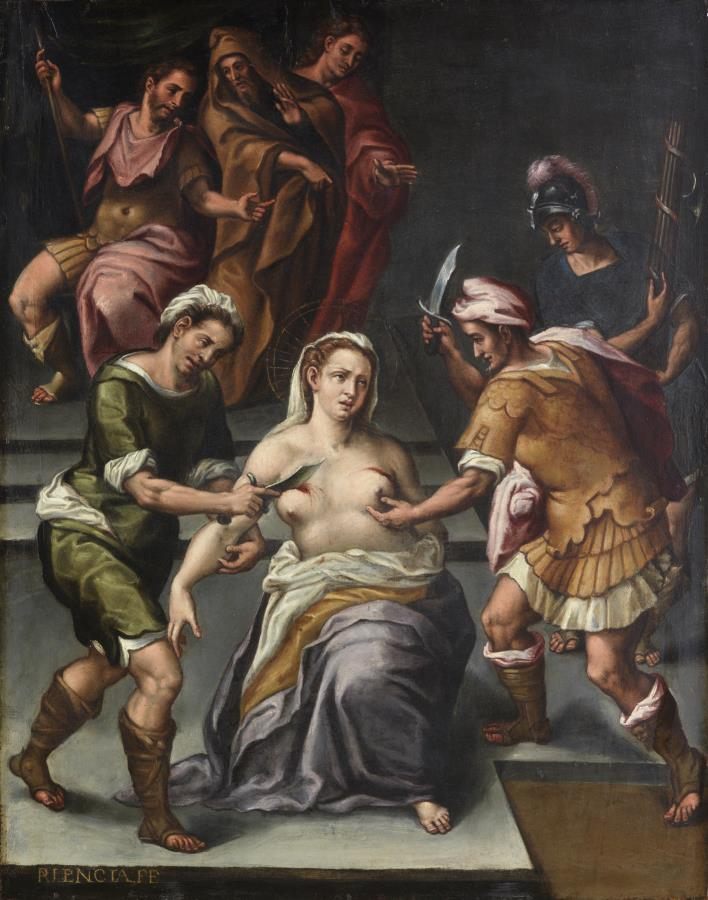 La obra representa el martirio de la virgen y mártir Santa Águeda, que murió en el siglo III por profesar el cristianismo.